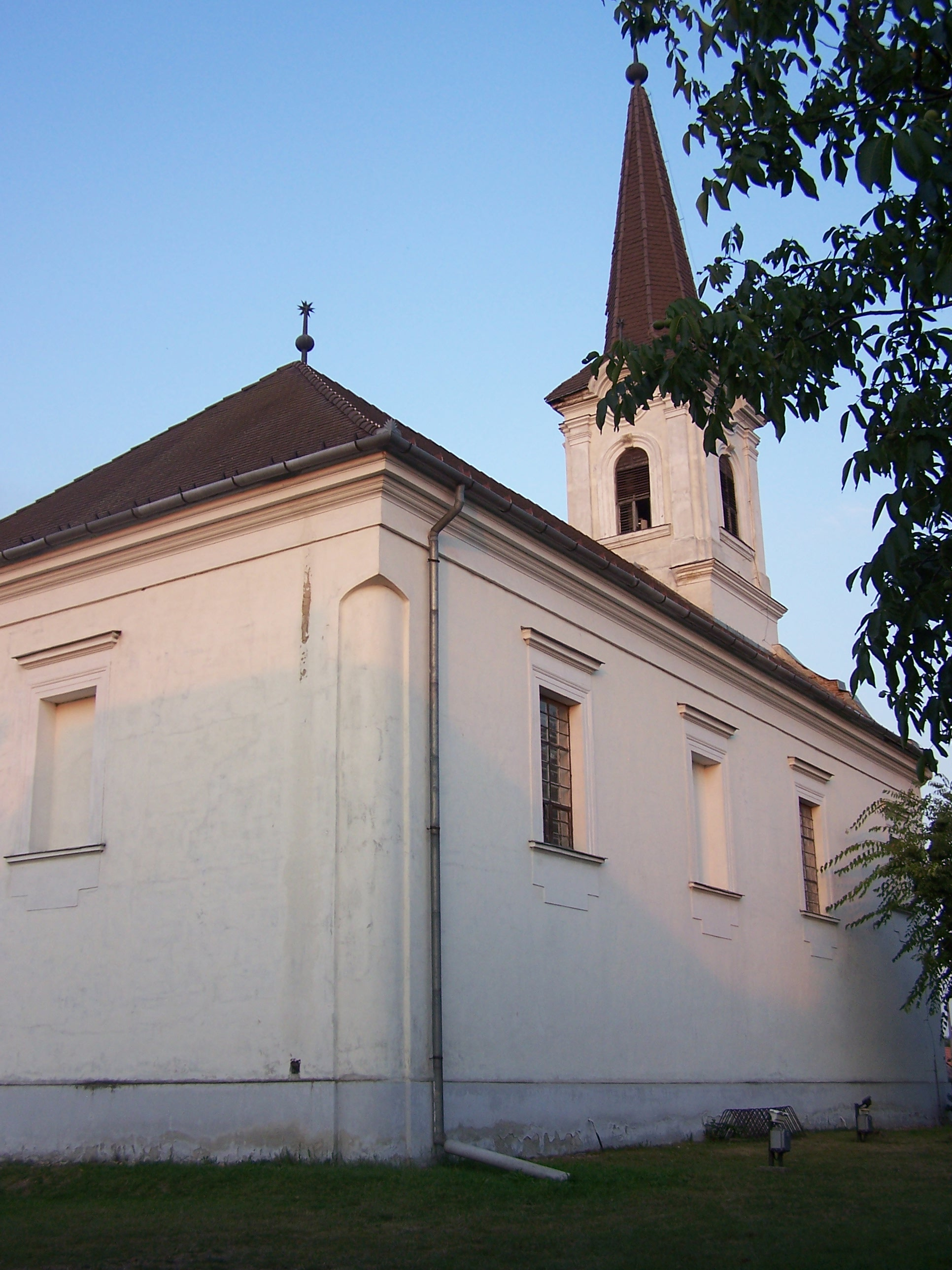 Református templom (Gyömrő, Gróf Teleki utca 85.) This is a photo of a monument in Hungary. Identifier: 7067